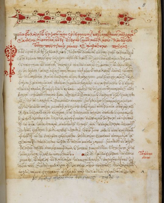 Матфей Властарь. Алфавитная синтагма. Греческая рукопись ноябрь 1600 год. Британская библиотека.